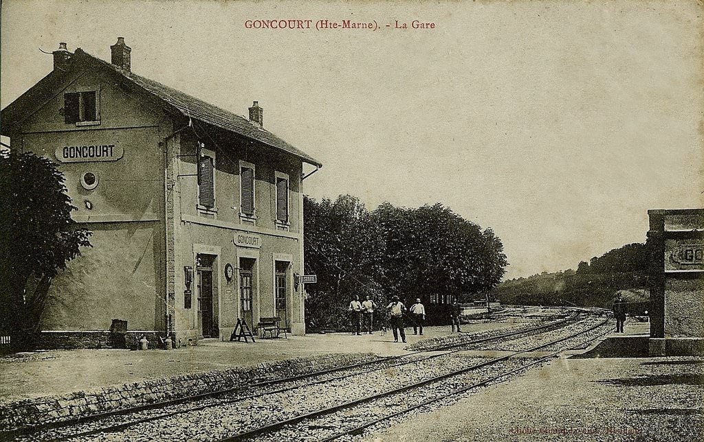 Carte postale de la gare vers 1910